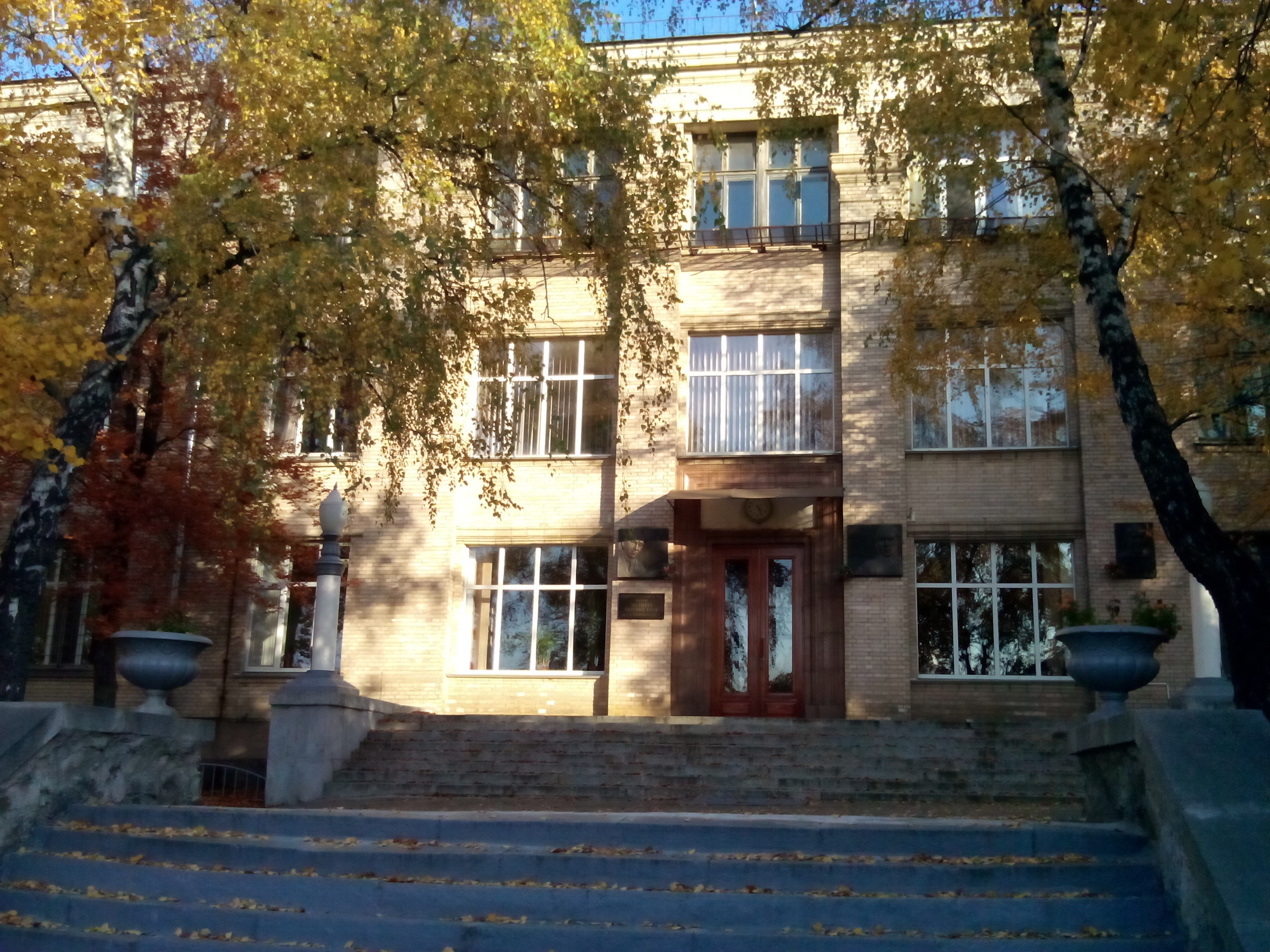 Будинок Інституту фізичної хімії ім. Л. Писаржевського, в якому працювали академіки: у 1958–1969 роках — О. І. Бродський; у 1958–1973 роках — В. А. Ройтер та інші, Київ, Науки просп., 31